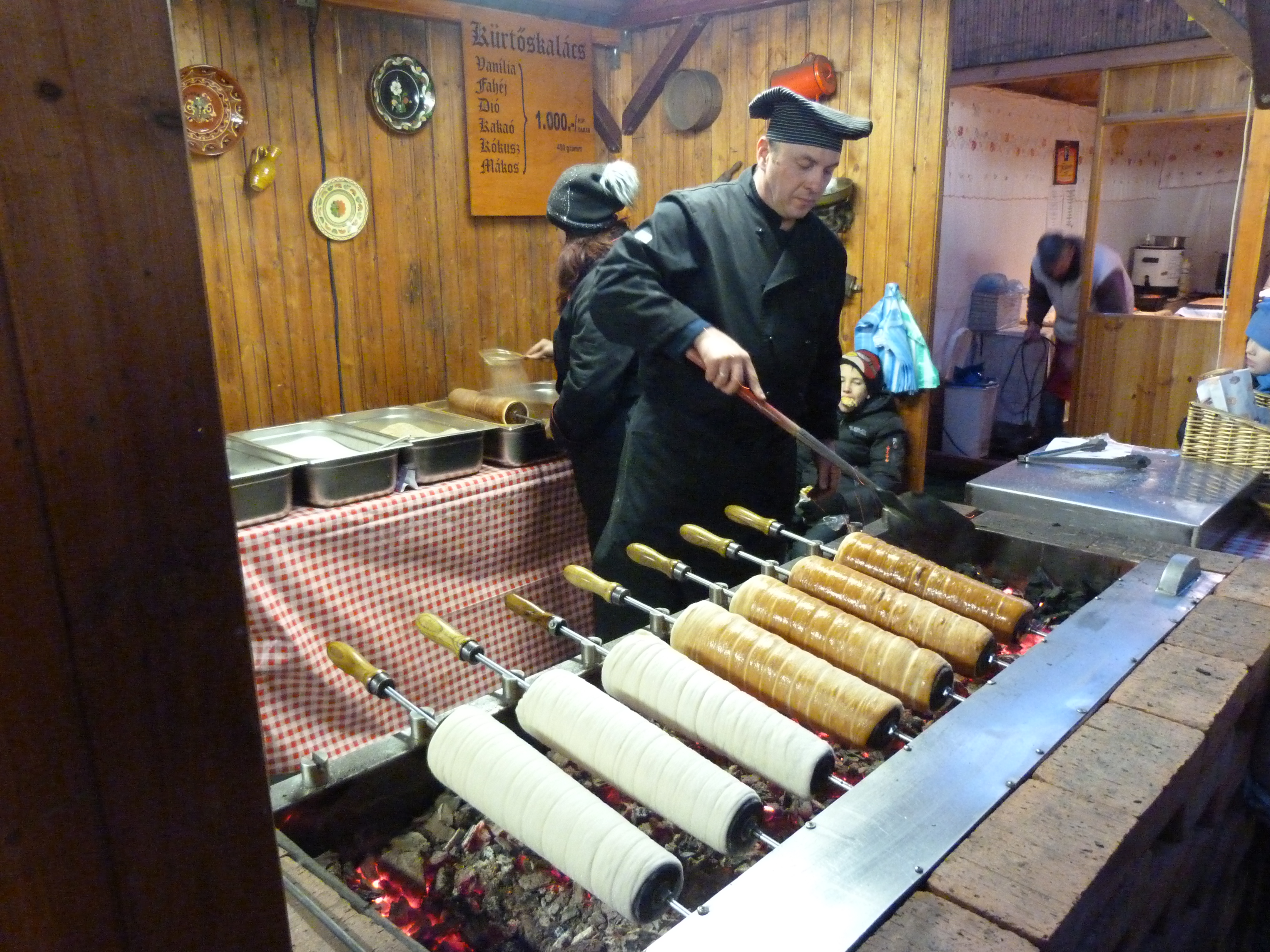 A felvétel 2015. február 7-én szombaton készült Miskolcon. Miskolci Kocsonyafesztivál. ©© Derzsi Elekes Andor, Budapest, 2015, Published in the Metapolisz DVD line. You are authorised to use this photo under Creative Commons – even for commercial, for profit purposes. The vid must be attributed to Derzsi Elekes Andor. All of the photos and vids in the Metapolisz DVD line are under Creative Commons and can be used even for commercial – for profit – purposes. Recommended Citation Derzsi Elekes Andor: Metapolisz DVD line